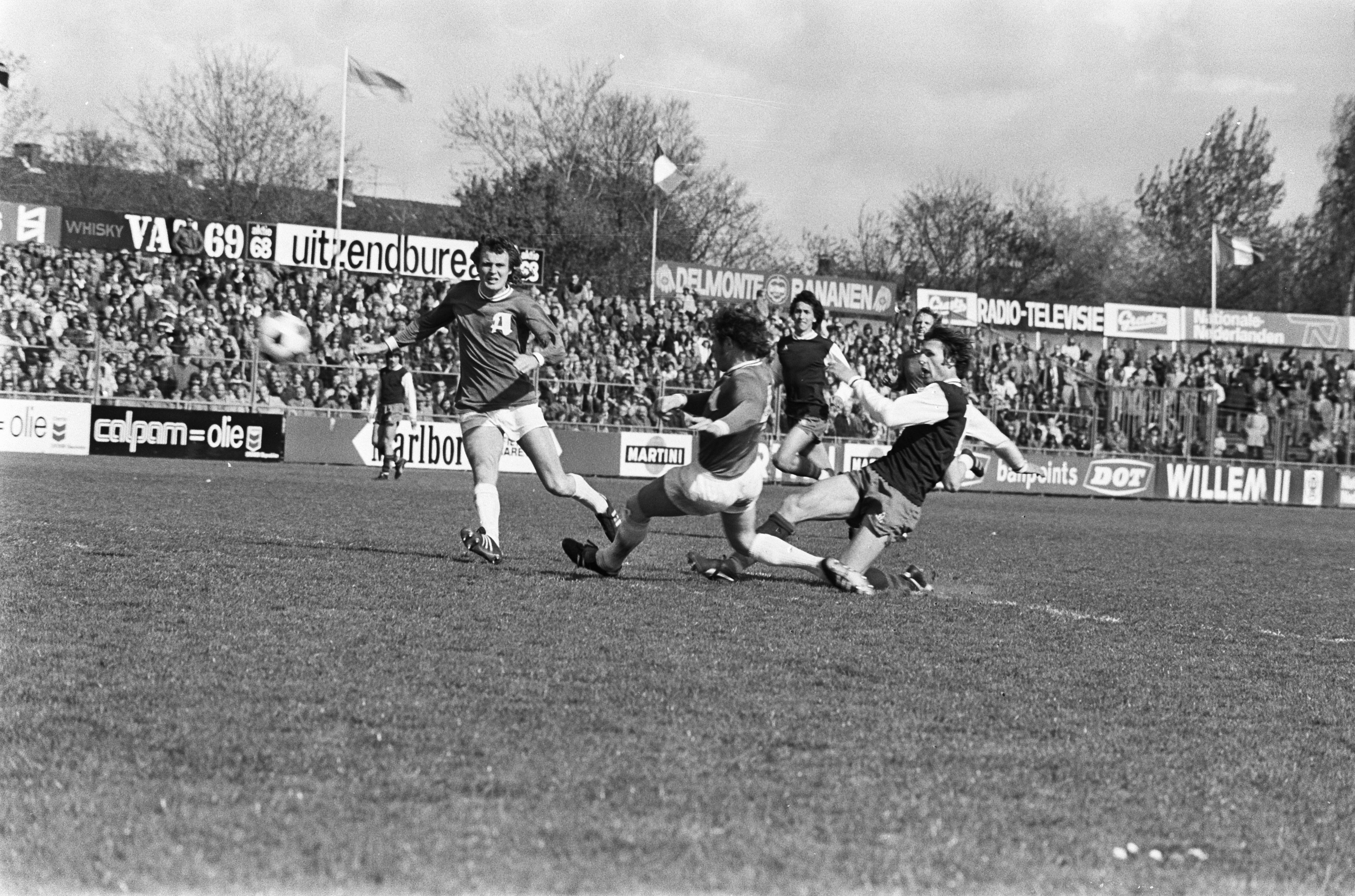 Match de football Haarlem - Excelsior (1-0). Frappe de Piet van den Berg (à droite, Haarlem), le défenseur de l'Excelsior Rinus Israël (à gauche) est devancé. Photographie par Rob Bogaerts / Anefo.